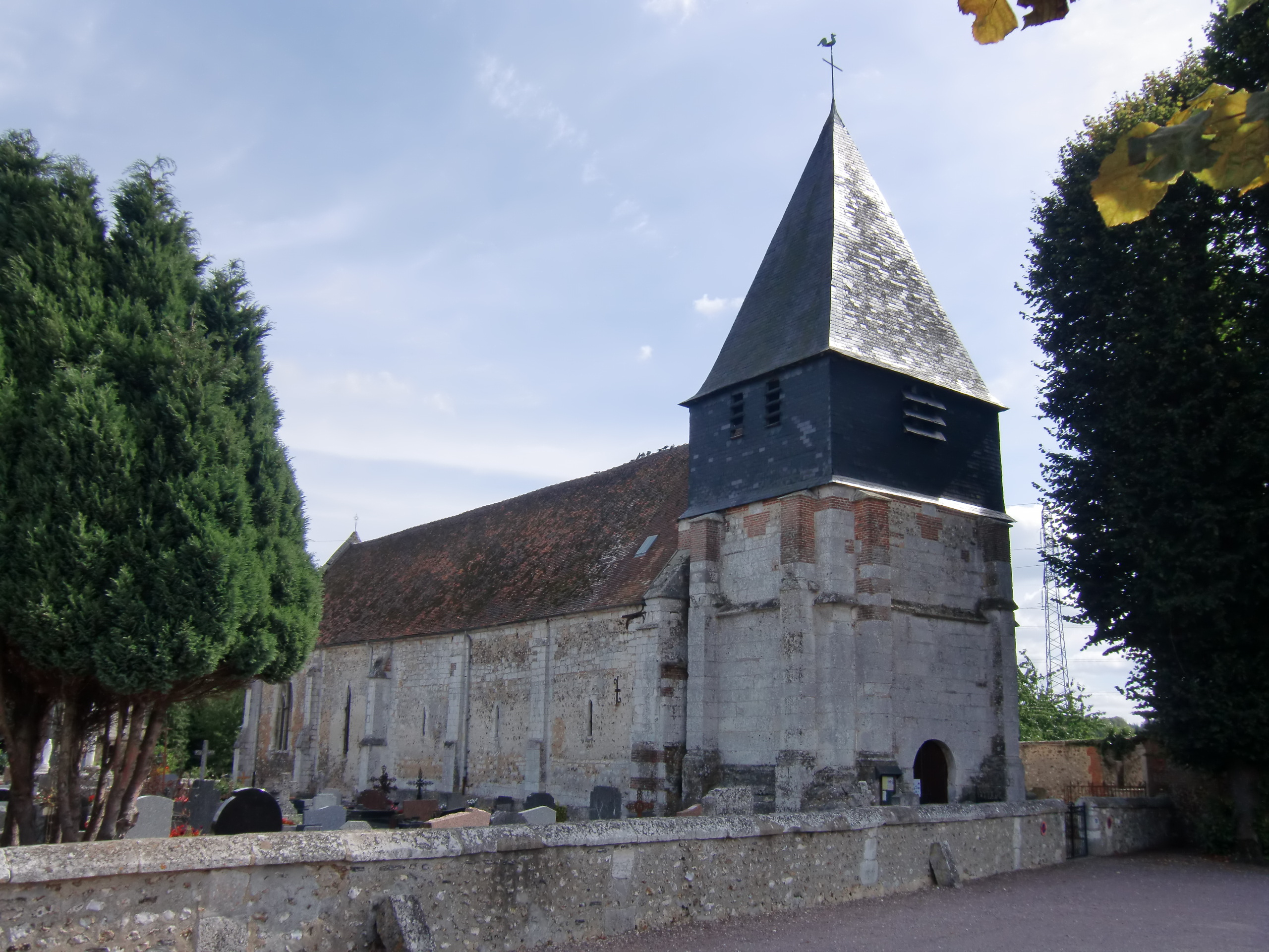 église de Notre-Dame de l'Assomption, Caumont (Eure, Normandie, France)